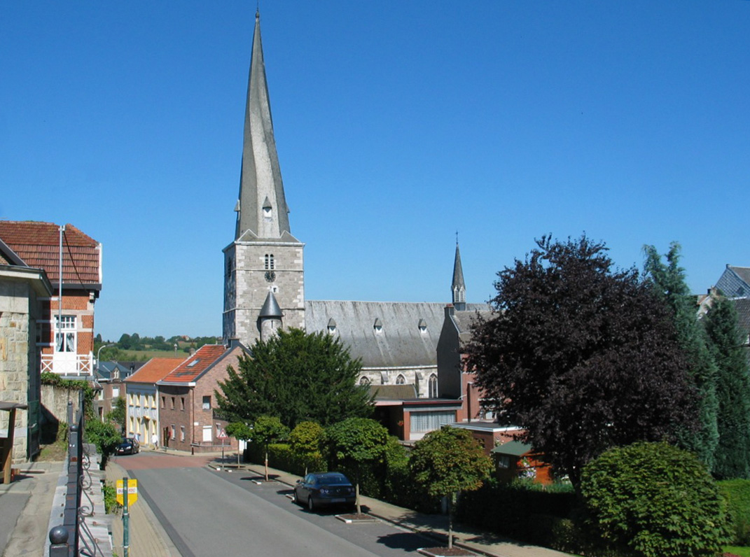 Baelen Kierch